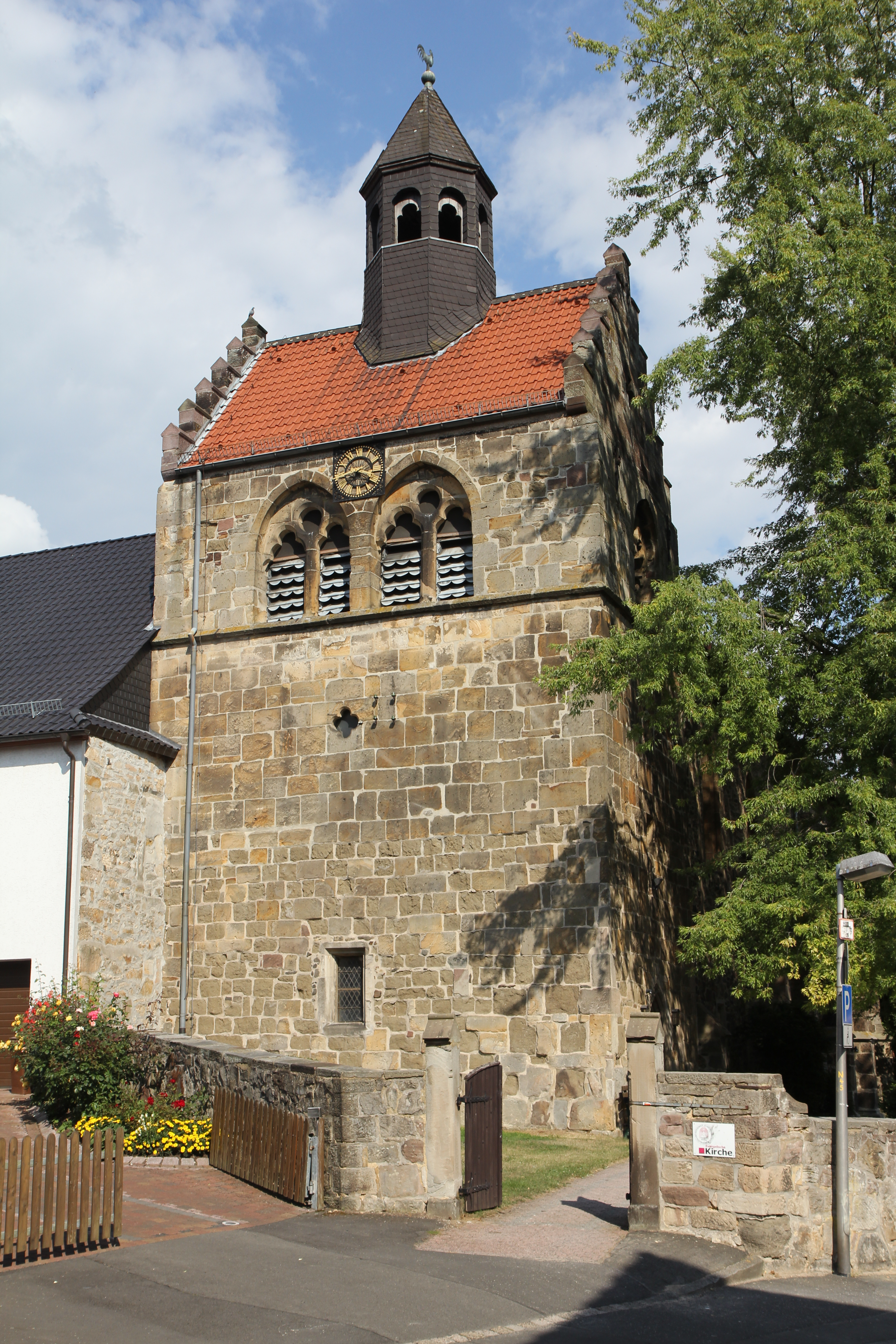 Spätromanischer Westturm der Klosterkirche Nordshausen - erbaut um etwa 1240 bis 1250.